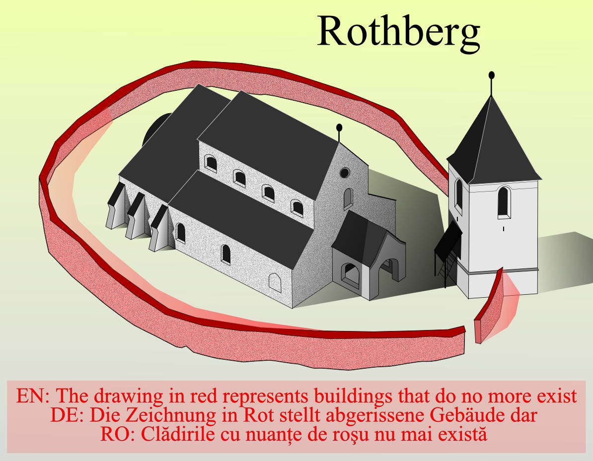 Biserica fortificata din Rosia